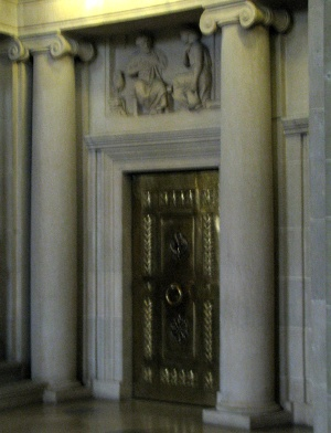 Christuskirche in Mannheim-Oststadt.